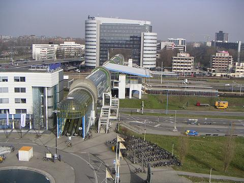 Foto vanuit NH Hotel, uitzicht op station Zoetermeer & omgeving